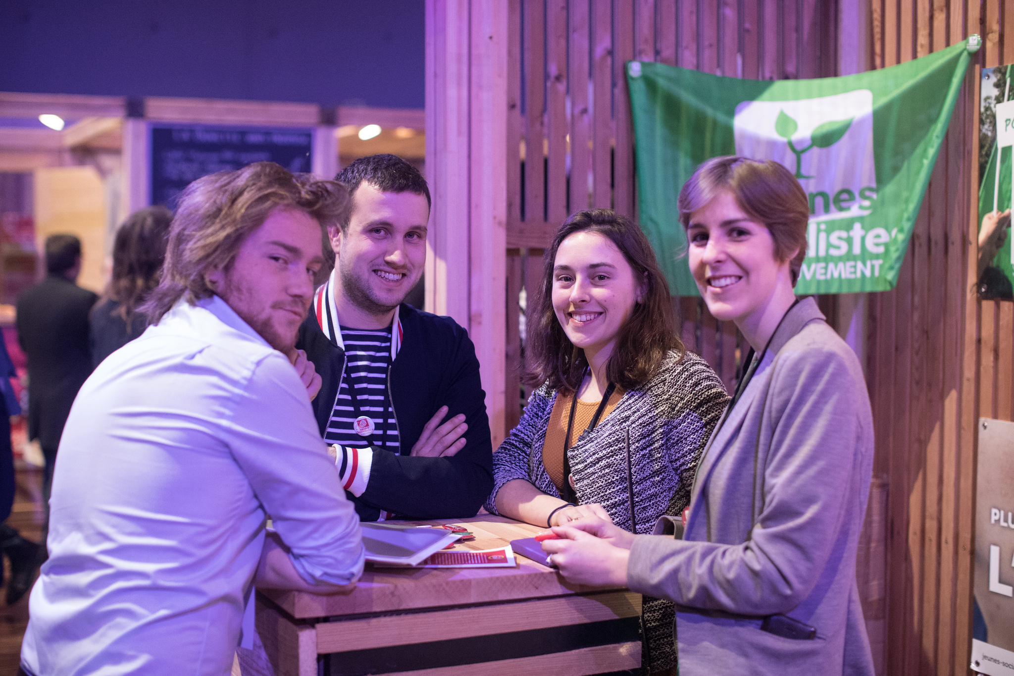 Photo datant du congrès d'Aubervilliers du Parti Socialiste